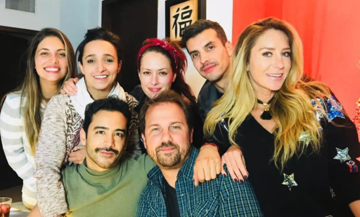 Partiendo la rosca de Día de Reyes // Geraldine Bazán